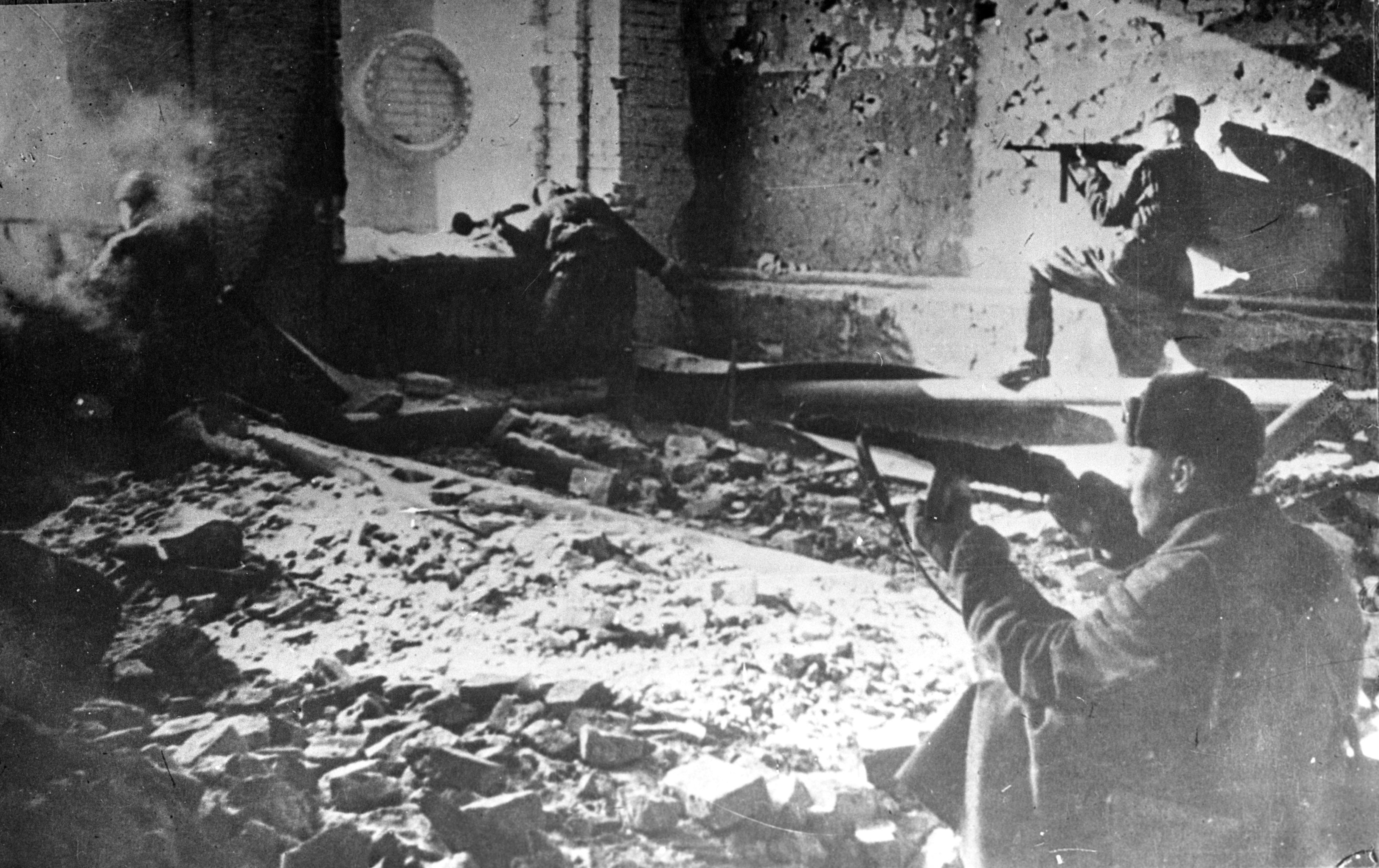 Russland, Kesselschlacht Stalingrad ADN-ZB/SNB/ II. Weltkrieg 1939-45 Die Stalingrader Schlacht begann im Juli 1942. In erbitterten, beiderseits verlustreichen Kämpfen wehrte die Rote Armee das weitere Vordringen der faschistischen Truppen ab. Während der sowjetischen Gegenoffensive im November 1942 wurden über 300 000 Mann eingeschlossen. Die Reste dieser Verbände, etwa 91 000 Mann, kapitulierten am 31.1. und 2.2.1943 Stalingrad im Oktober 1942; sowjetische MPi-Schützen kämpfen in den Ruinen des Werkes "Roter Oktober"